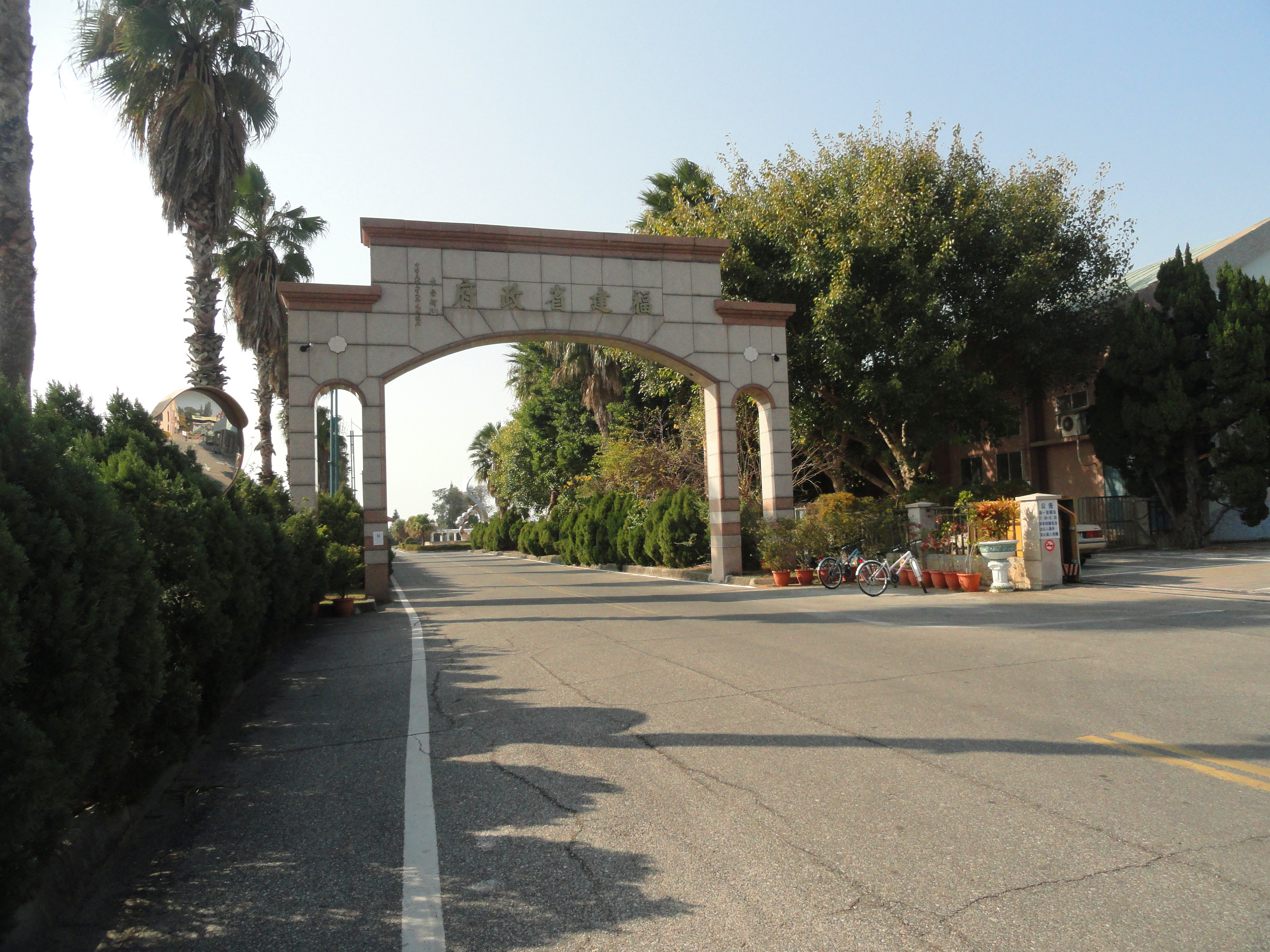 福建省政府大院大门